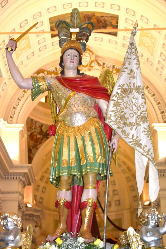 Fercolo di San Michele Arcangelo presso la Chiesa Madre di San Michele di Ganzaria. Foto scattata personalmente